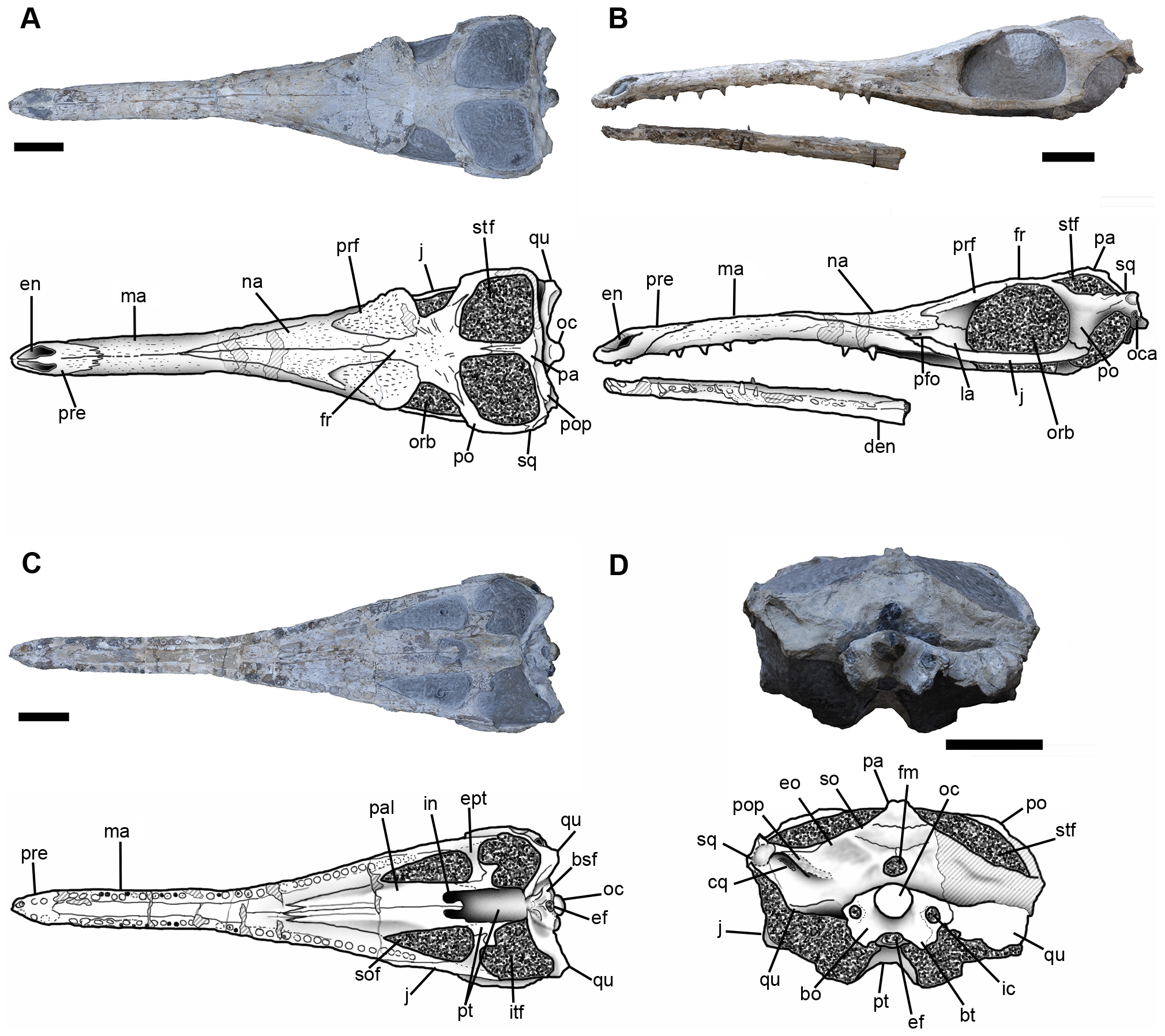 Skull of Maledictosuchus riclaensis gen. et sp. nov. holotype MPZ 2001/130a, photographs and interpretative drawings. A, dorsal view; B, left lateral view; C ventral view; D, posterior view. Scale bar = 5 cm. Stripped pattern represents rebuilt mastic surfaces. Dotted pattern represents matrix. Anatomical abbreviations: bo, basioccipital; bsf, basisphenoid; bt, basioccipital basal tubera; cq, cranioquadrate canal; den, dentary; ef, Eustachian foramen; en, external nares; eo, exoccipital; ept, ectopterygoids; fm, foramen magnum; fr, frontal; ic, foramen for the internal carotid artery; in, internal nares; itf, infratemporal fenestra; j, jugal; la, lachrymal; ma, maxilla; na, nasal; oc, occipital condyle; oca, otic canal; orb, orbit; pa, parietal; pal, palatine; pfo, preorbital fossa; po, postorbital; pop, paroccipital process; pre, premaxilla; prf, prefrontal; pt, pterygoids; qu, quadrate; so, supraoccipital; sof, suborbital fenestra; sq, squamosal; stf, supratemporal fenestra.